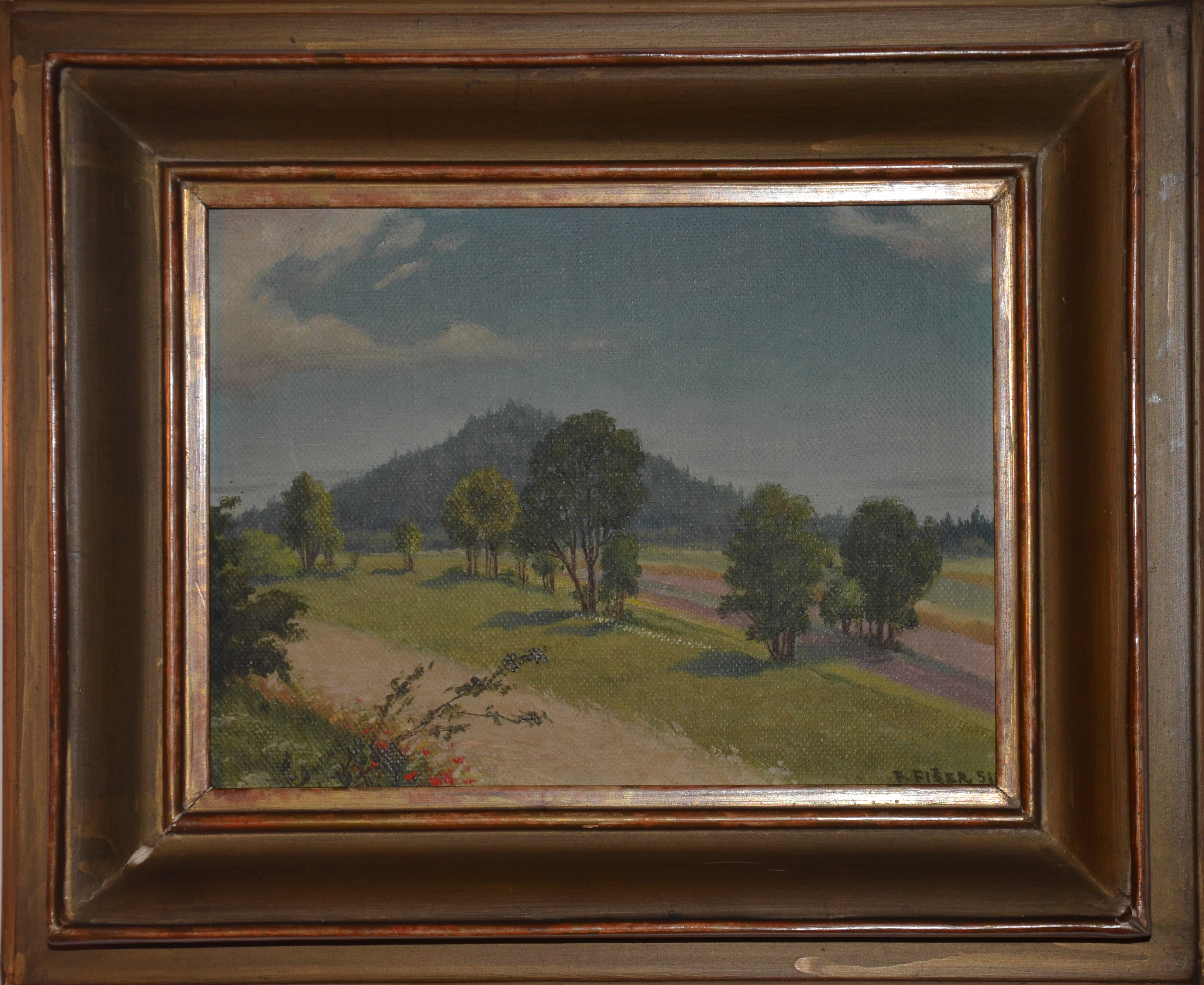 Stromy v krajině